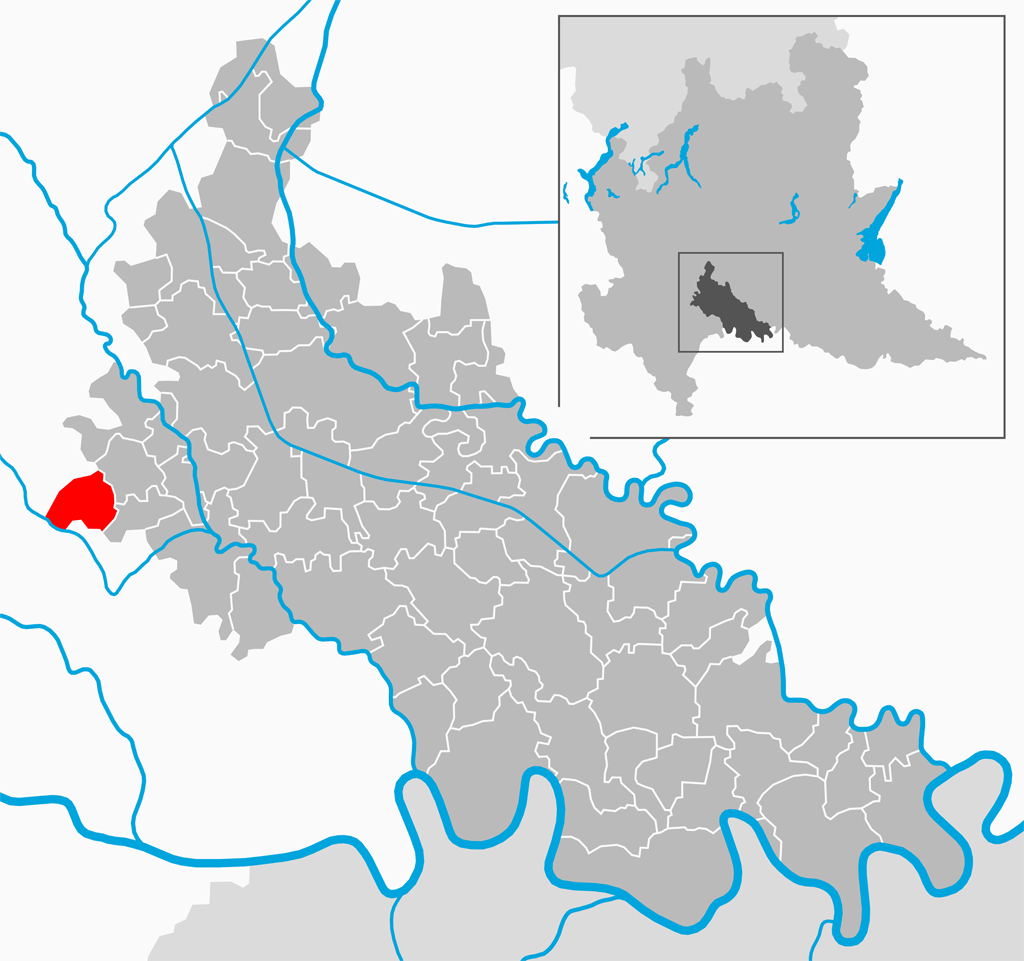 Il comune di Valera Fratta nella provincia di Lodi